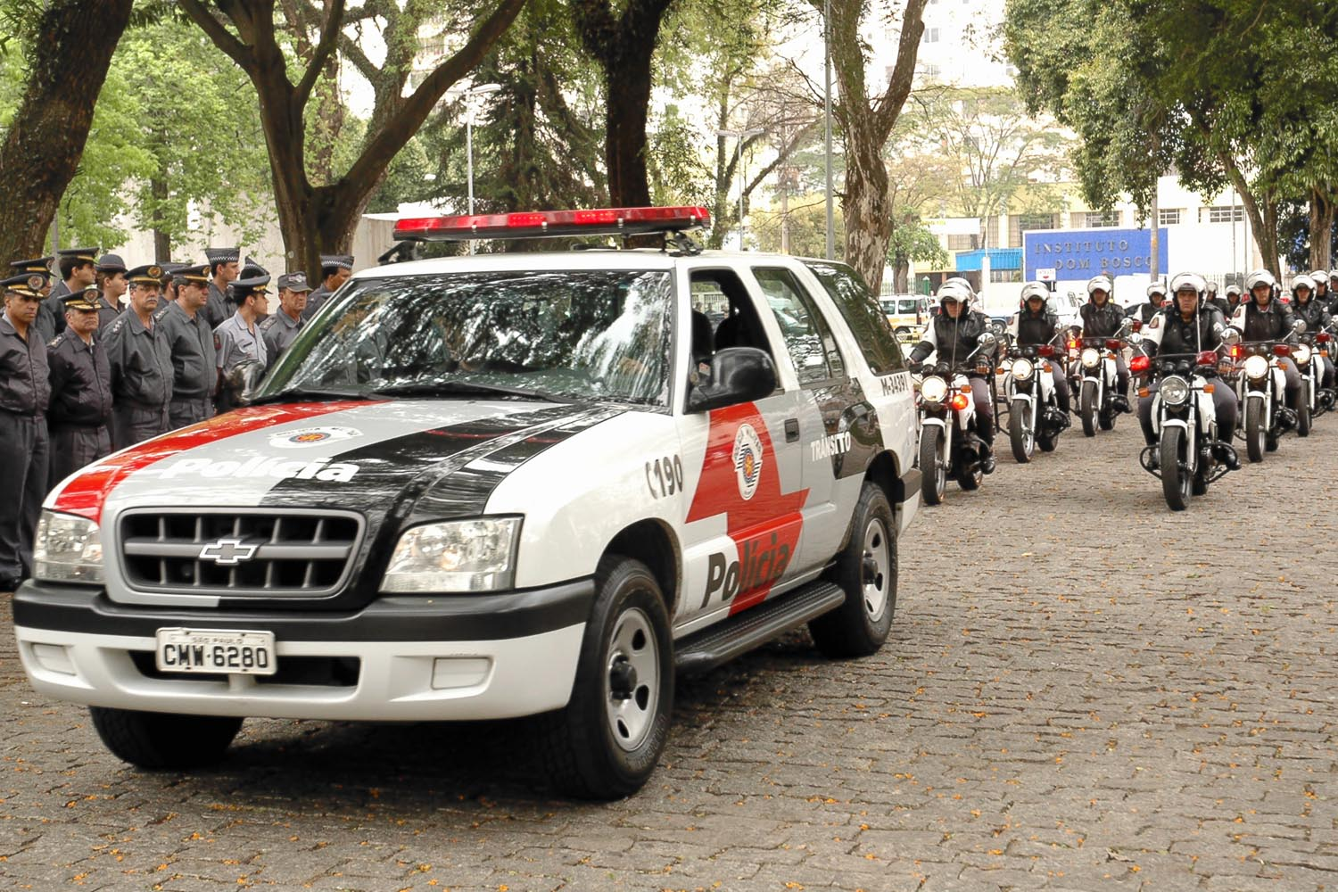 Polícia de SP